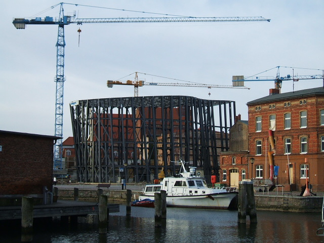 Das Foto zeigt die Baustelle für das Ozeaneum im März 2007.